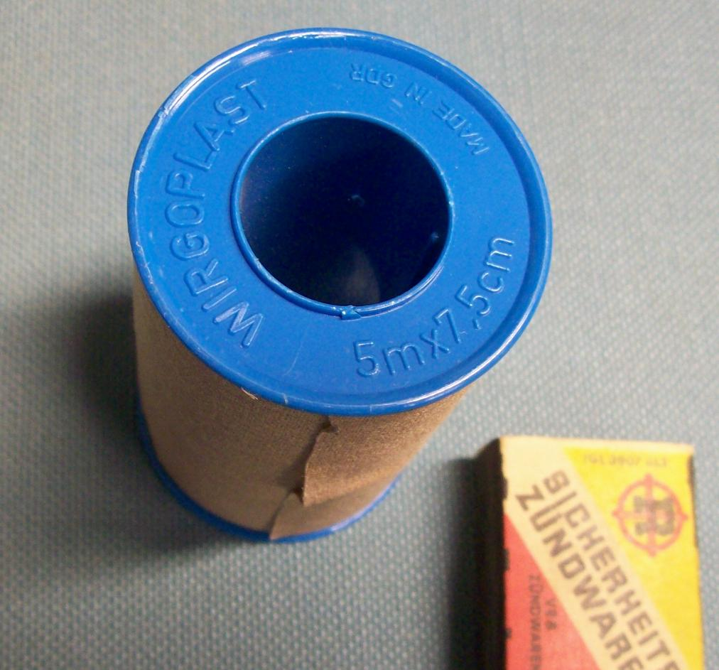 WIRGOPLAST von VEB Jenapharm